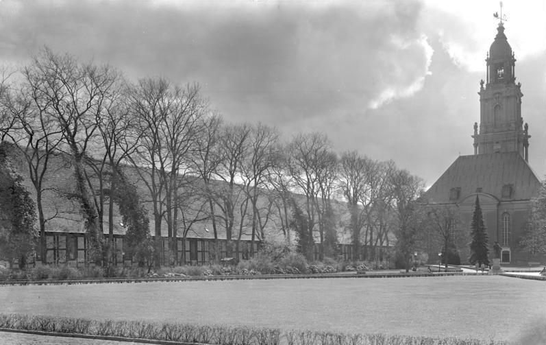 Potsdam.- Lange Piele , Langer Stall